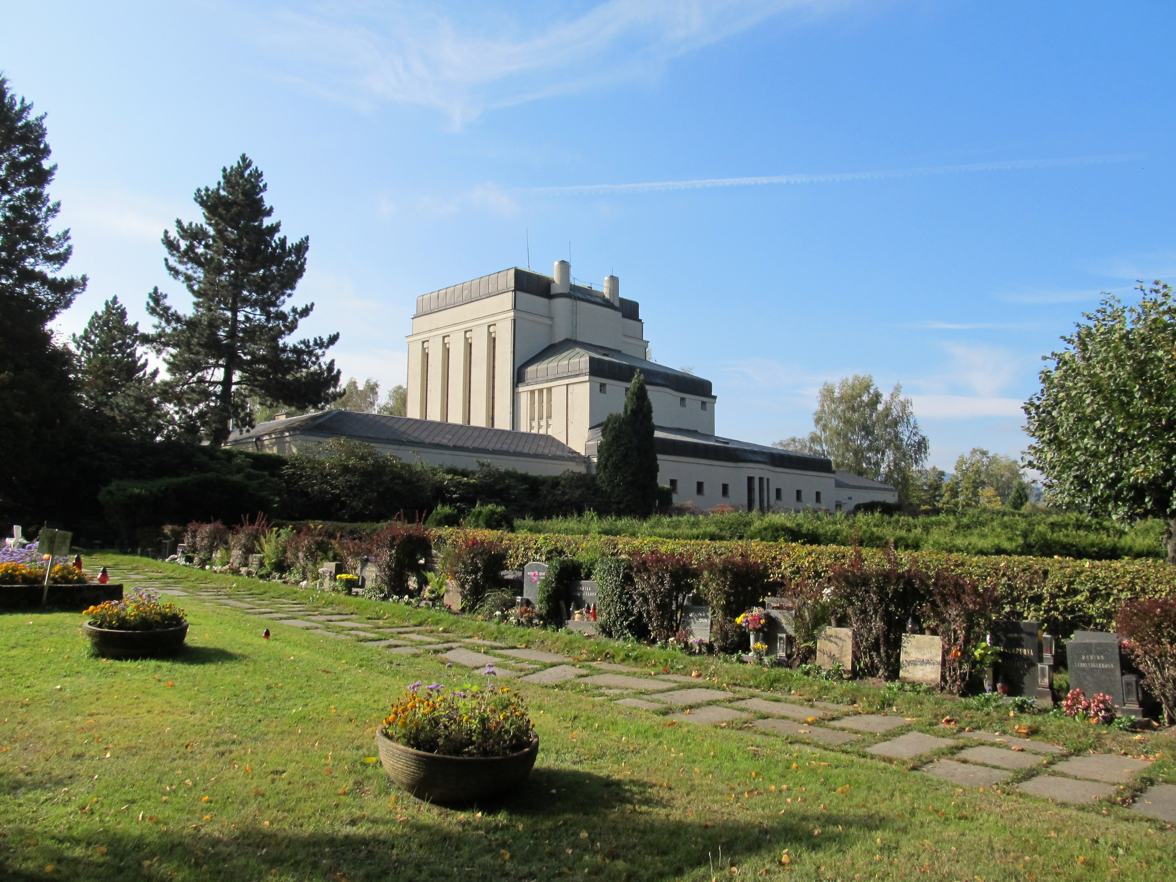 Krematorium, U krematoria 460/7, Liberec